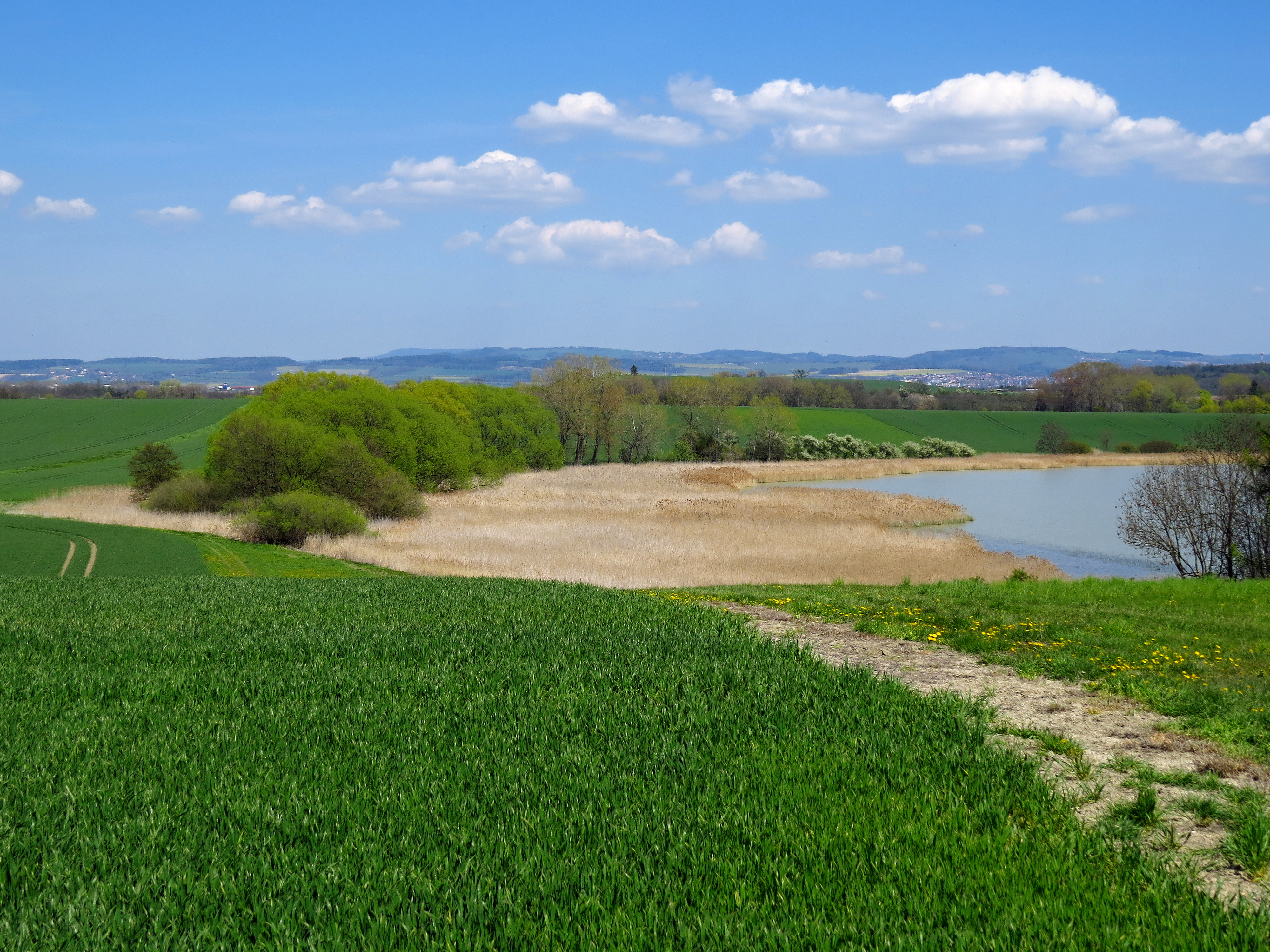 Pohled na část Tuřího rybníka porostlého rákosinami